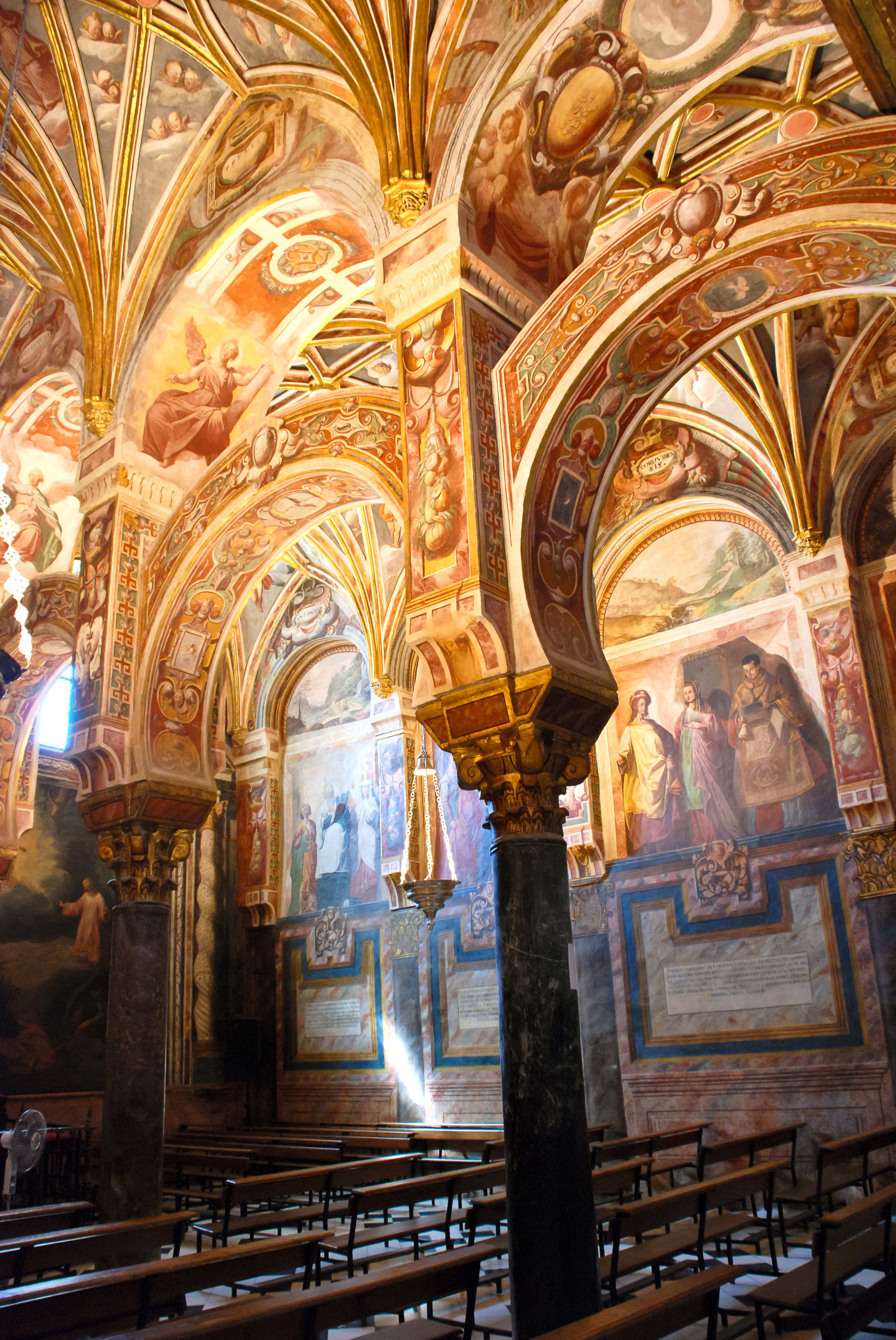 Mezquita de Córdoba (España).